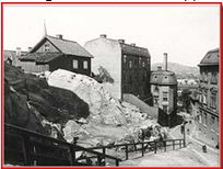 Poppelmans bryggeri andra platsen - Stigberget. Härifrån var inte steget långt till bryggan där Ostindiefararen lade till